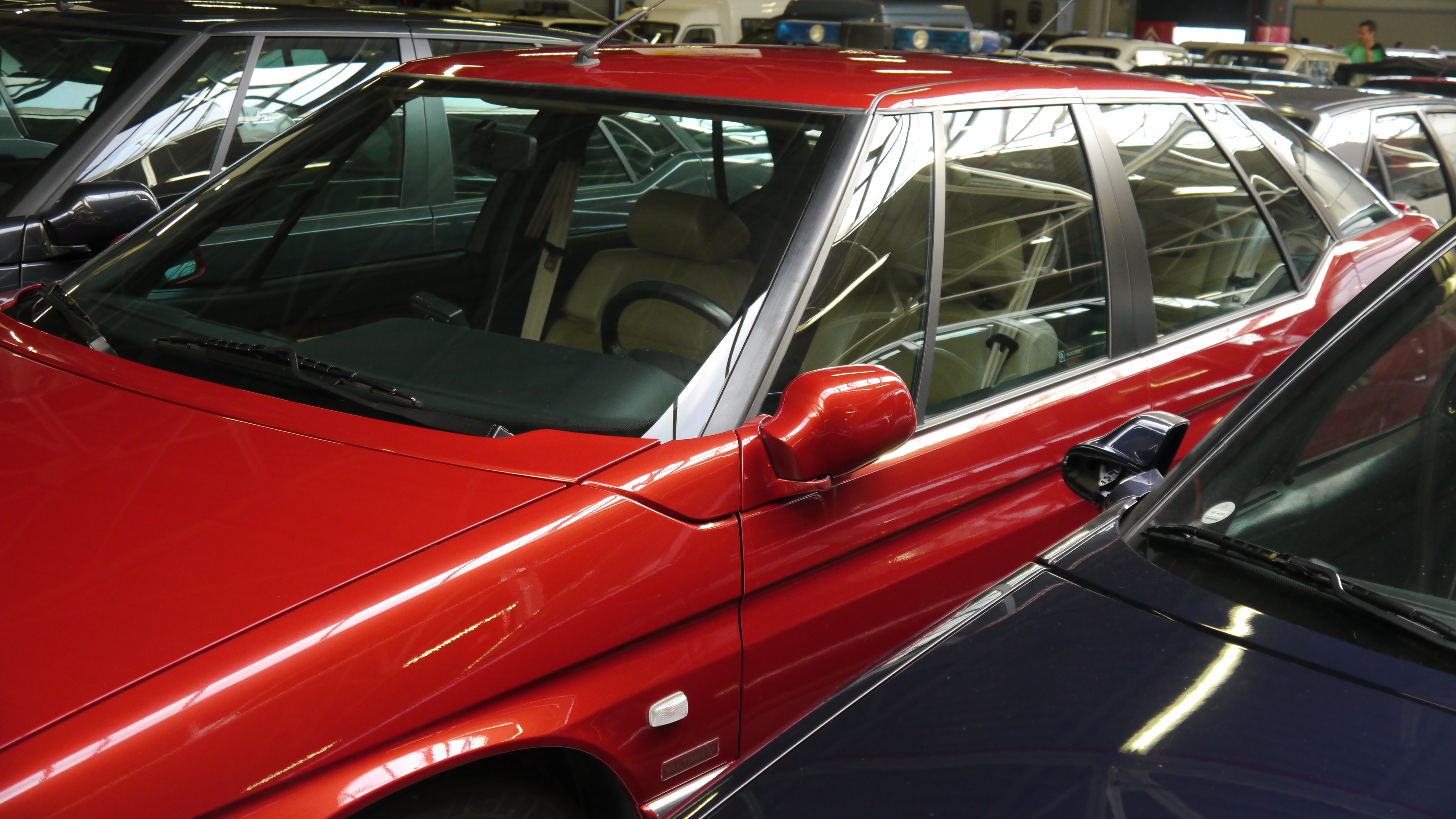 Conservatoire Citroen 256 Citroen XM